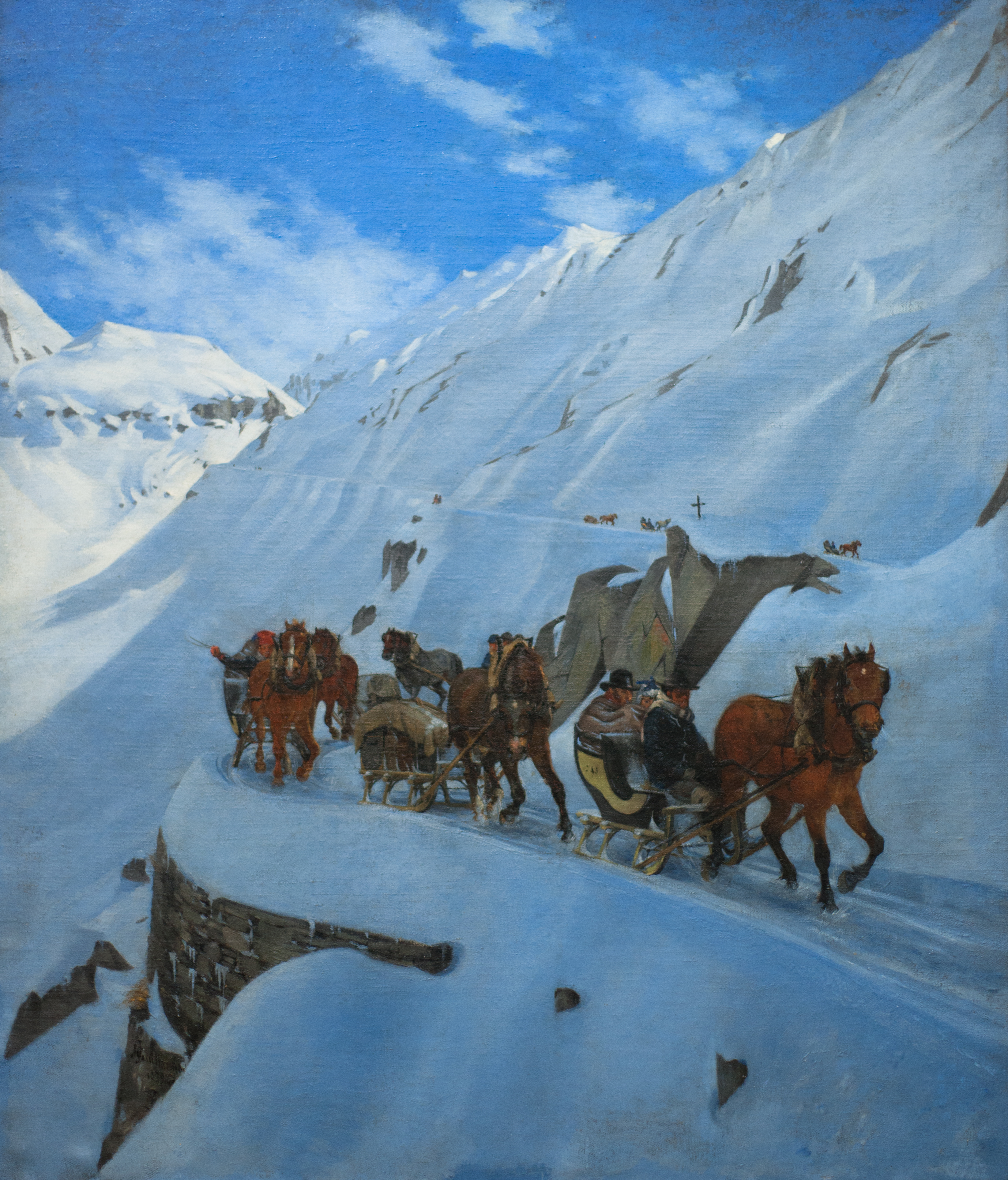 Convoi de la poste au Saint-Gothard en hiver. Huile sur toile de Jules Jacod Guillarmod